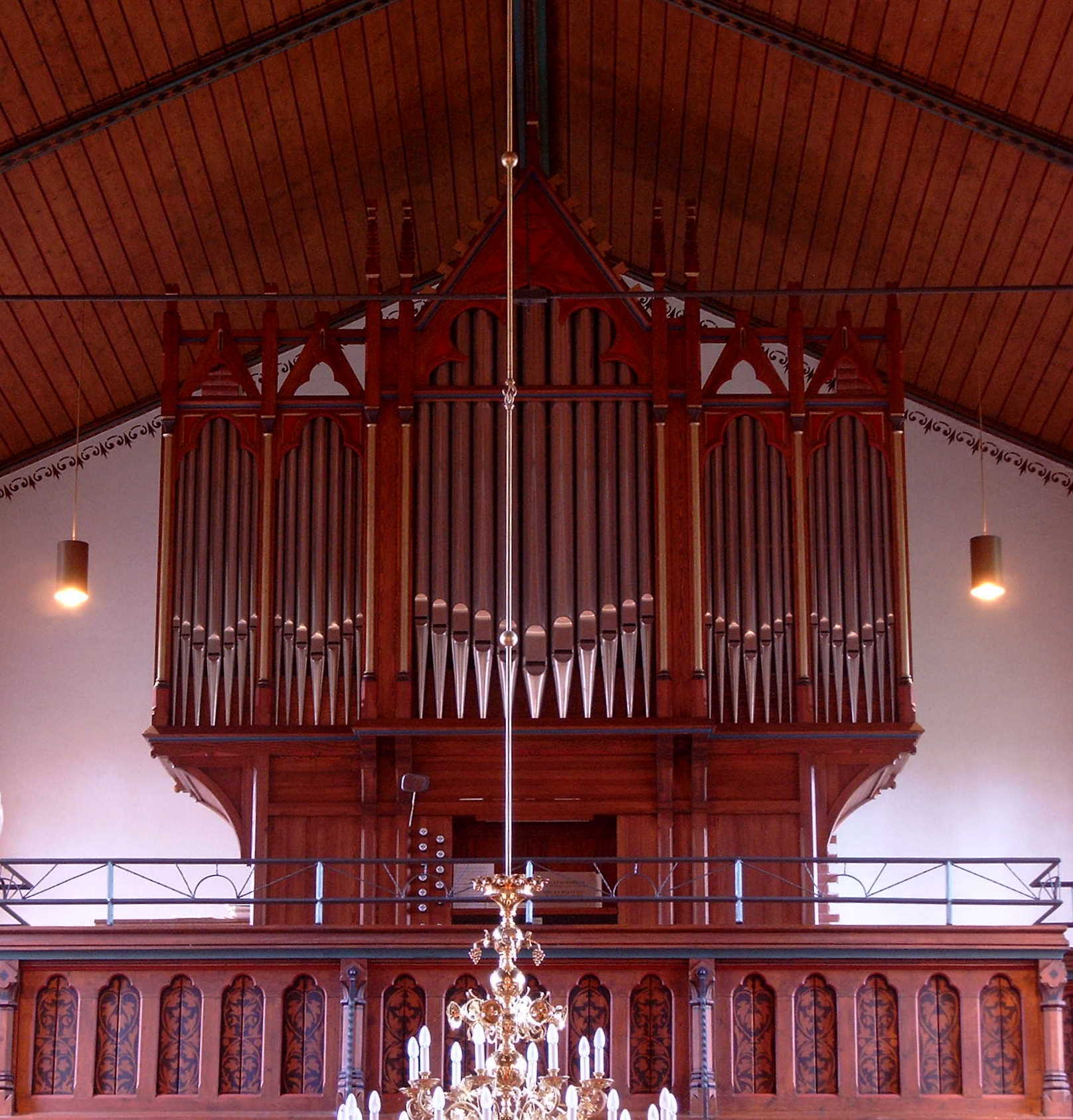 Orgel in Hollen, Ostfriesland